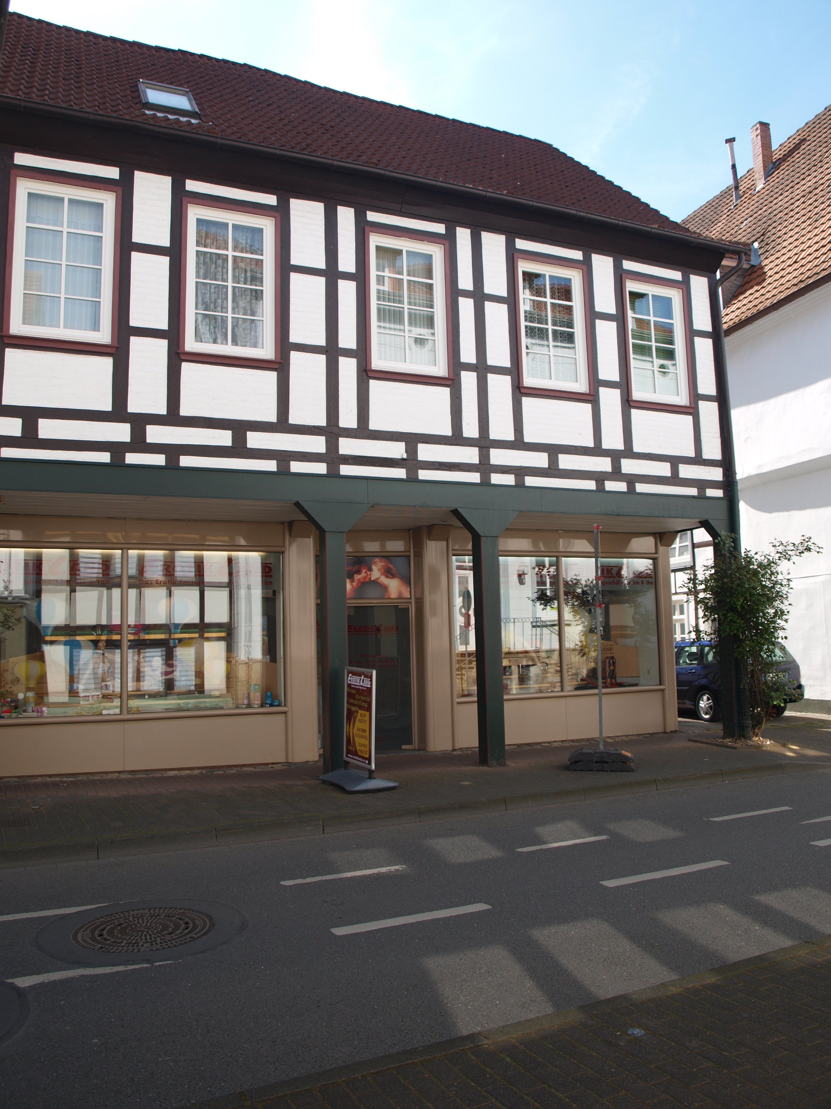 Stolpersteinlage Soest Jakobistr 21